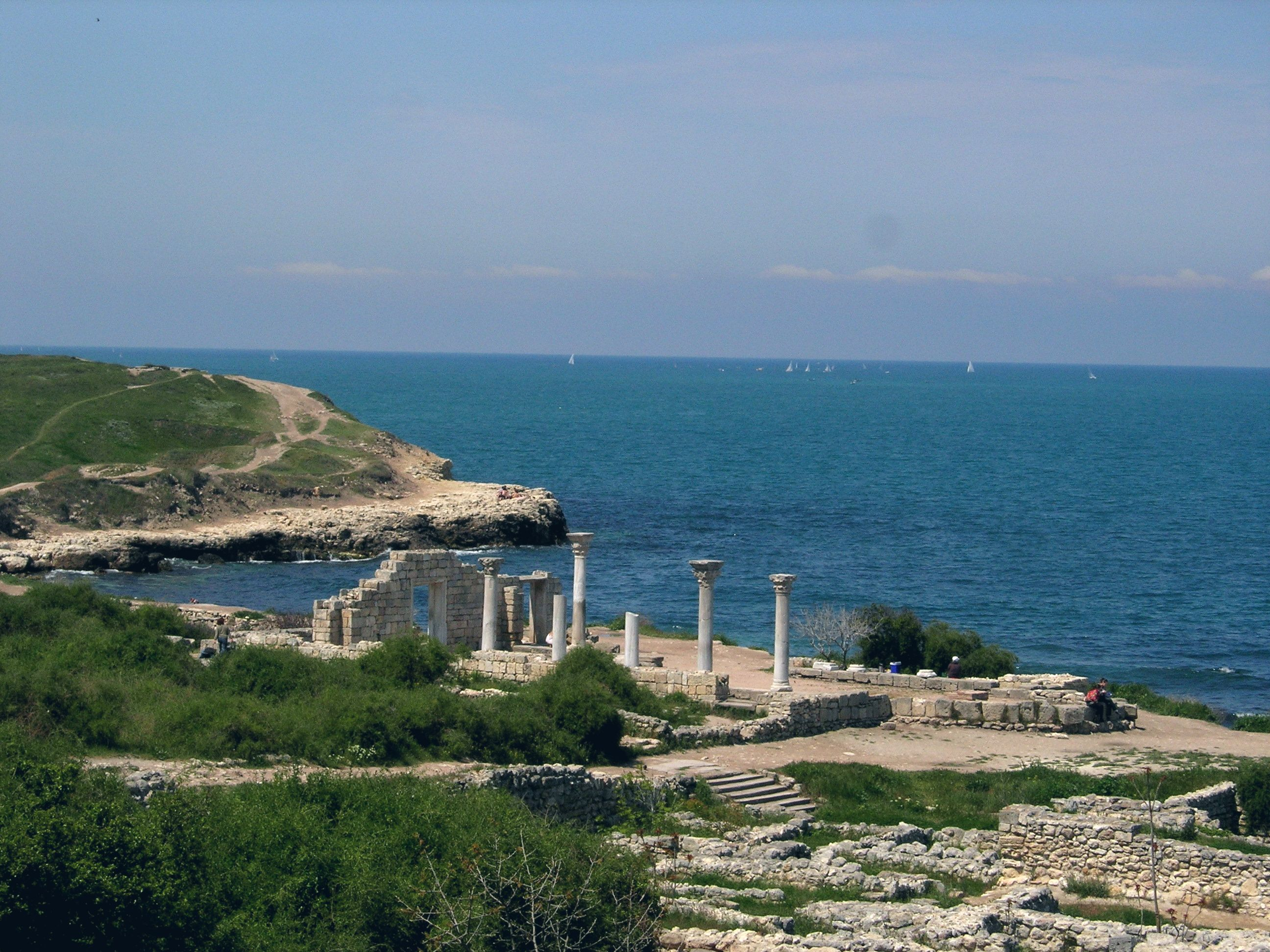 Вид на развалины Херсонеса